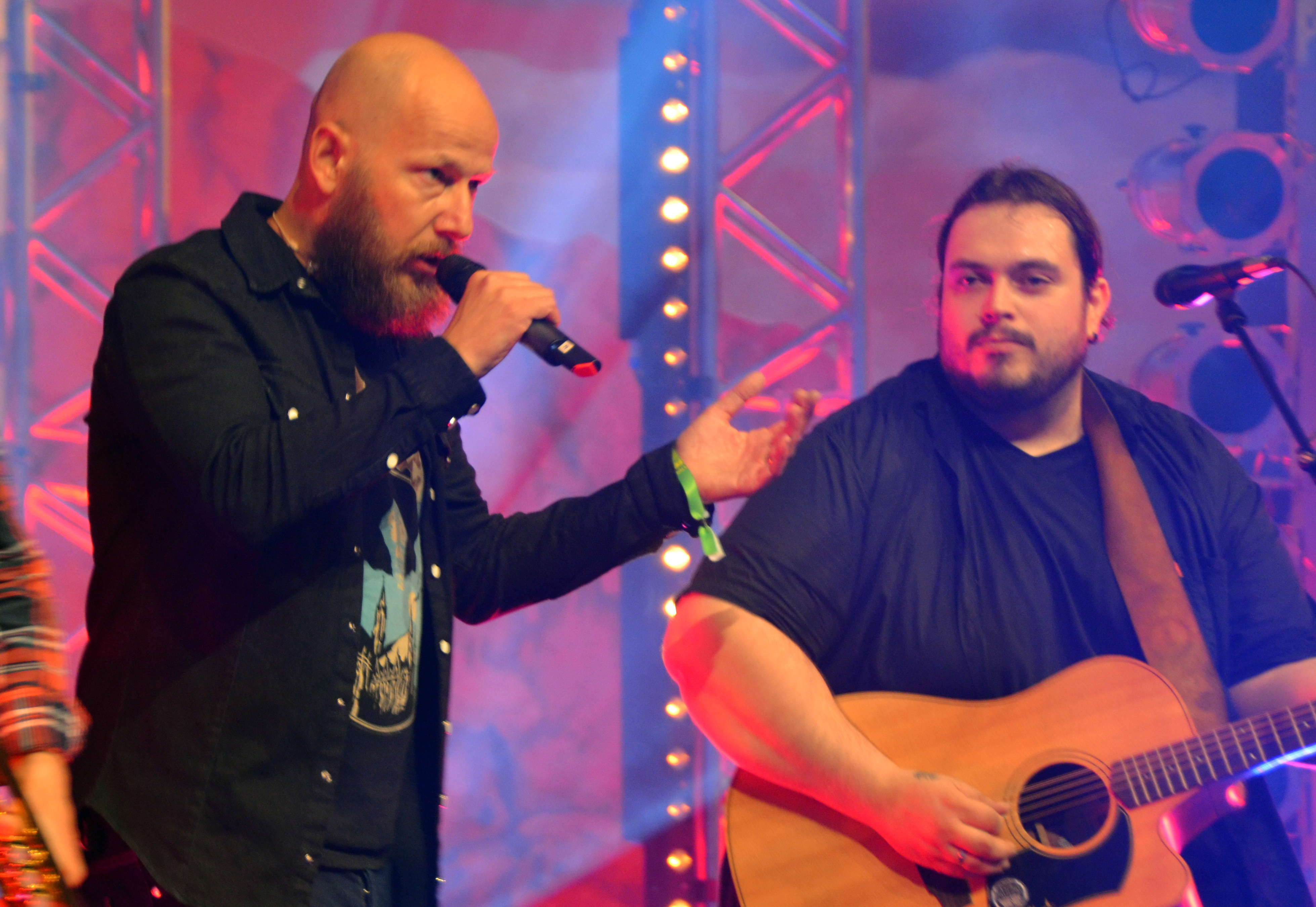 Heimatsound-Festival 2014,Sebastian Horn und Mathias Kellner Festivalsommer This photo was created with the support of donations to Wikimedia Deutschland in the context of the CPB project "Festival Summer". This file is made available under the Creative Commons CC0 1.0 Universal Public Domain Dedication. The person who associated a work with this deed has dedicated the work to the public domain by waiving all of their rights to the work worldwide under copyright law, including all related and neighboring rights, to the extent allowed by law. You can copy, modify, distribute and perform the work, even for commercial purposes, all without asking permission. Personality rights warningAlthough this work is freely licensed or in the public domain, the person(s) shown may have rights that legally restrict certain re-uses unless those depicted consent to such uses. In these cases, a model release or other evidence of consent could protect you from infringement claims.